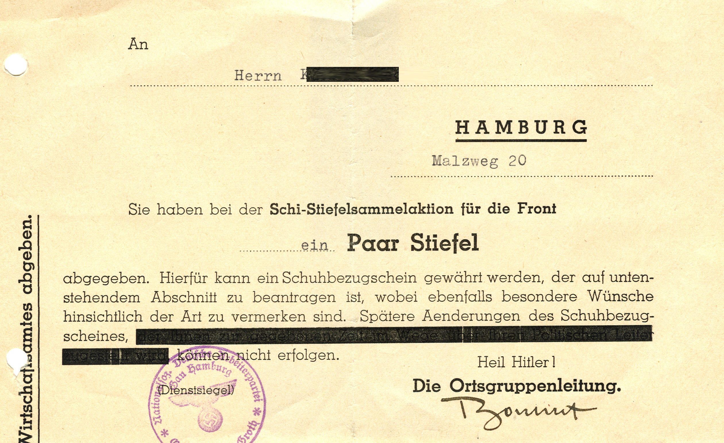 Spendenbescheinigung aus 1943 der Nationalsozialistischen Deutschen Arbeiterpartei, Gau Hamburg, Ortsgruppenleitung. Text: An Herrn (Name geschwärzt), Hamburg, Malzweg 20. Sie haben bei der Schi-Stiefelsammelaktion für die Front ein Paar Stiefel abgegeben. Hierfür kann ein Schuhbezugschein gewährt werden, der auf untenstehendem Abschnitt zu beantragen ist, wobei ebenfalls besondere Wünsche hinsichtlich der Art zu vermerken sind. Spätere Aenderungen des Schuhbezugscheines, (nachfolgender Text geschwärzt) können nicht erfolgen. Heil Hitler! Die Ortsgruppenleitung. Unterschrift, Dienstsiegel.